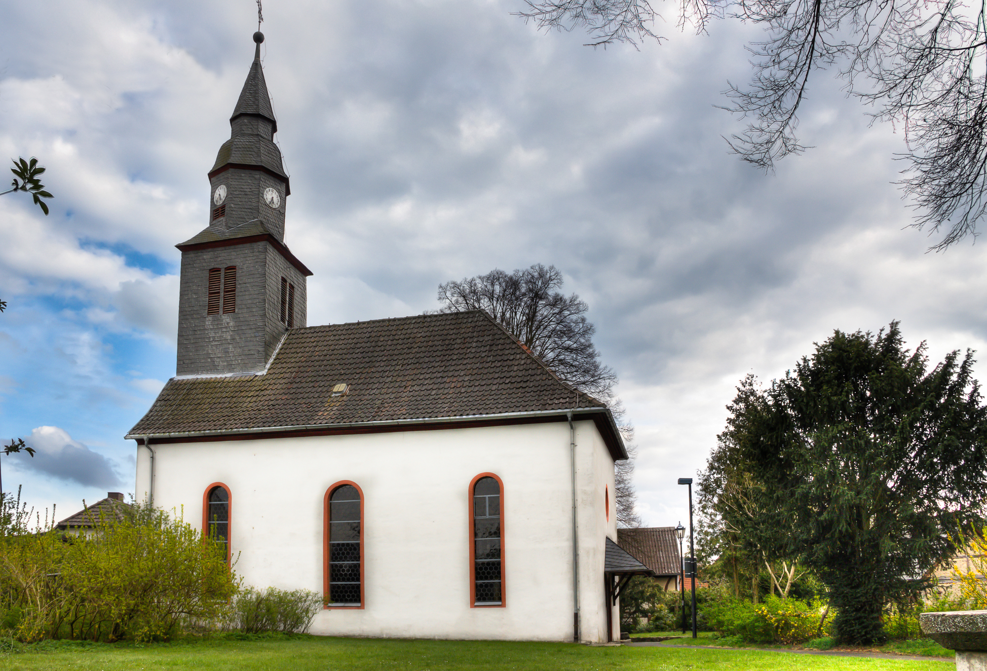 Evangelische Kirche Albach, Gemeinde Fernwald, Landkreis in Hessen, Deutschland